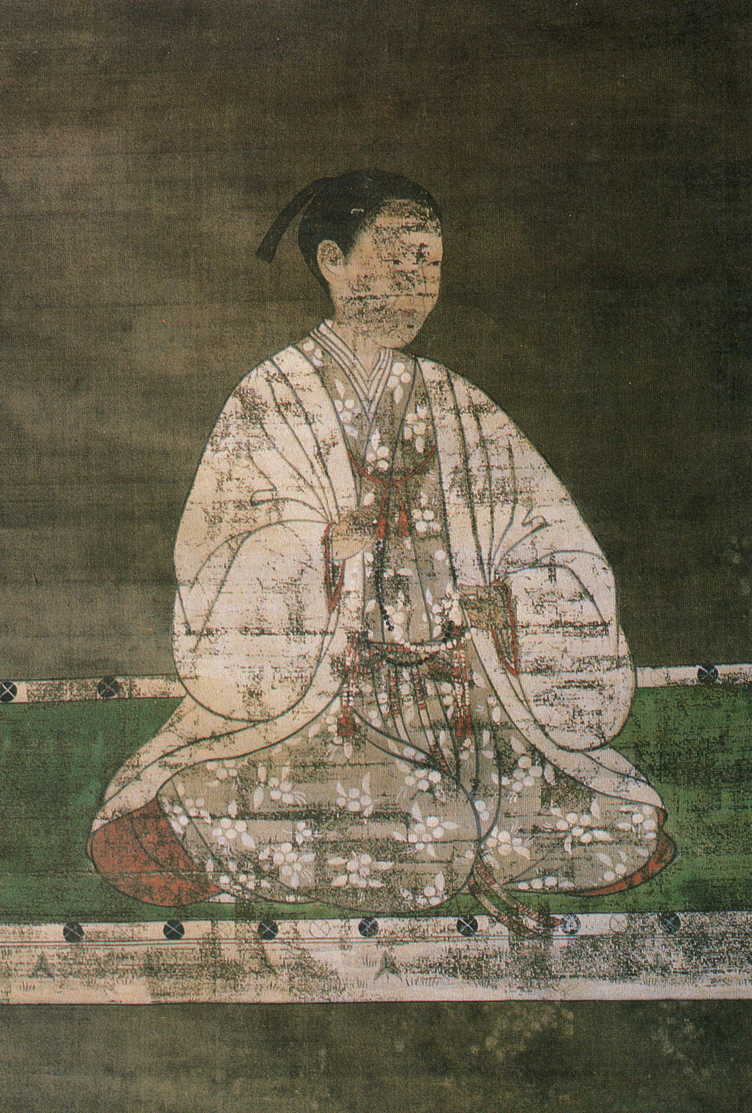 華陽院(大河内元綱の養女、水野忠政の正室)の肖像。